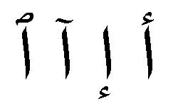 אליף וכל הסימנים הדיאקריטיים האפשריים שלה